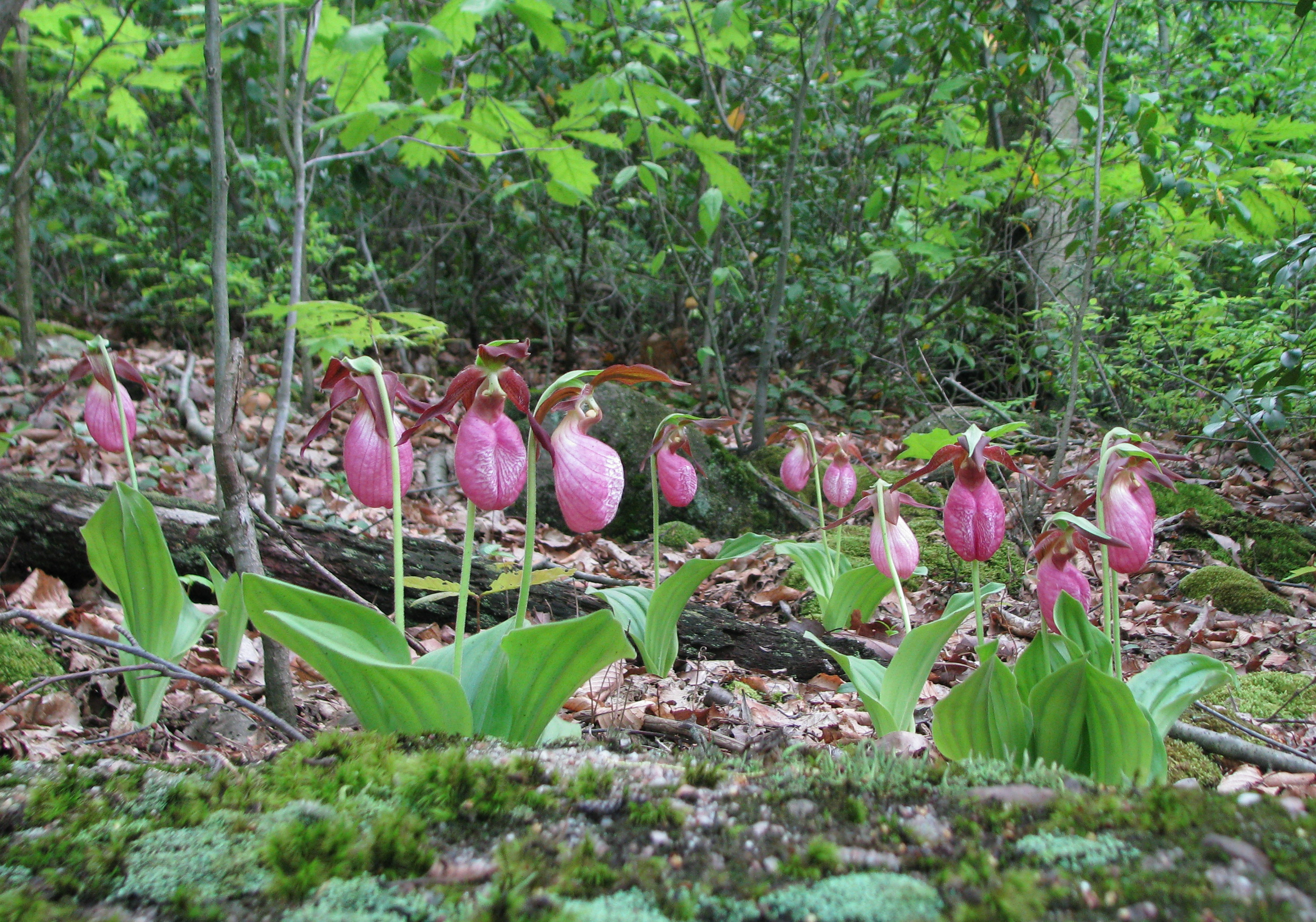 Cypripedium acaule, Pink ladyslippers , . . . again